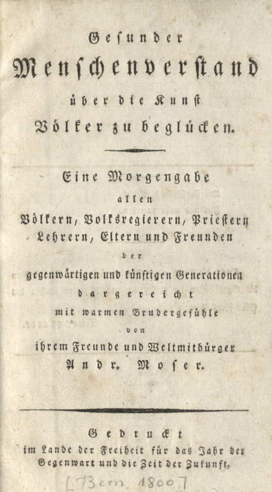 Andreas Moser: Gesunder Menschenverstand (Erstausgabe). Helvetien ohne Jahr (St. Gallen 1800).